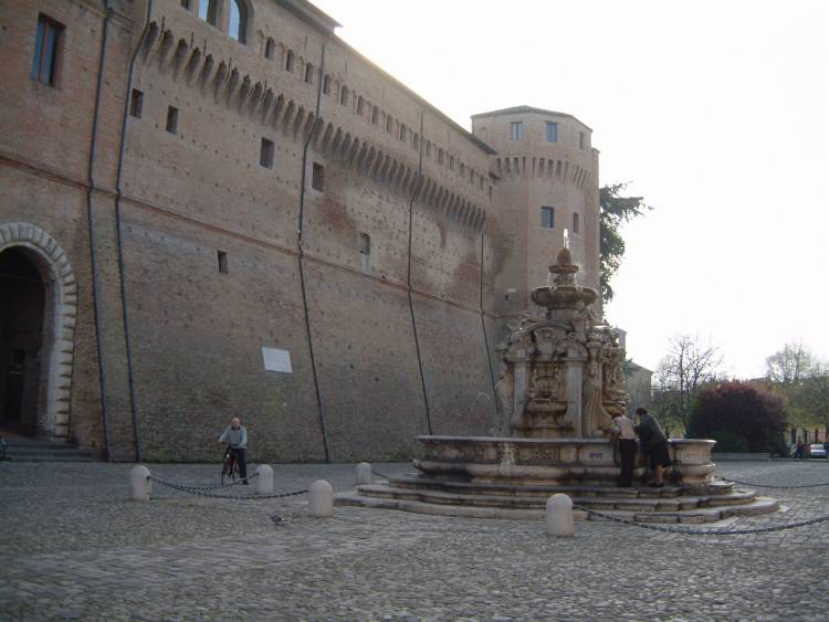 Je suis l'auteur de cette photo prise en avril 2007 à cesena